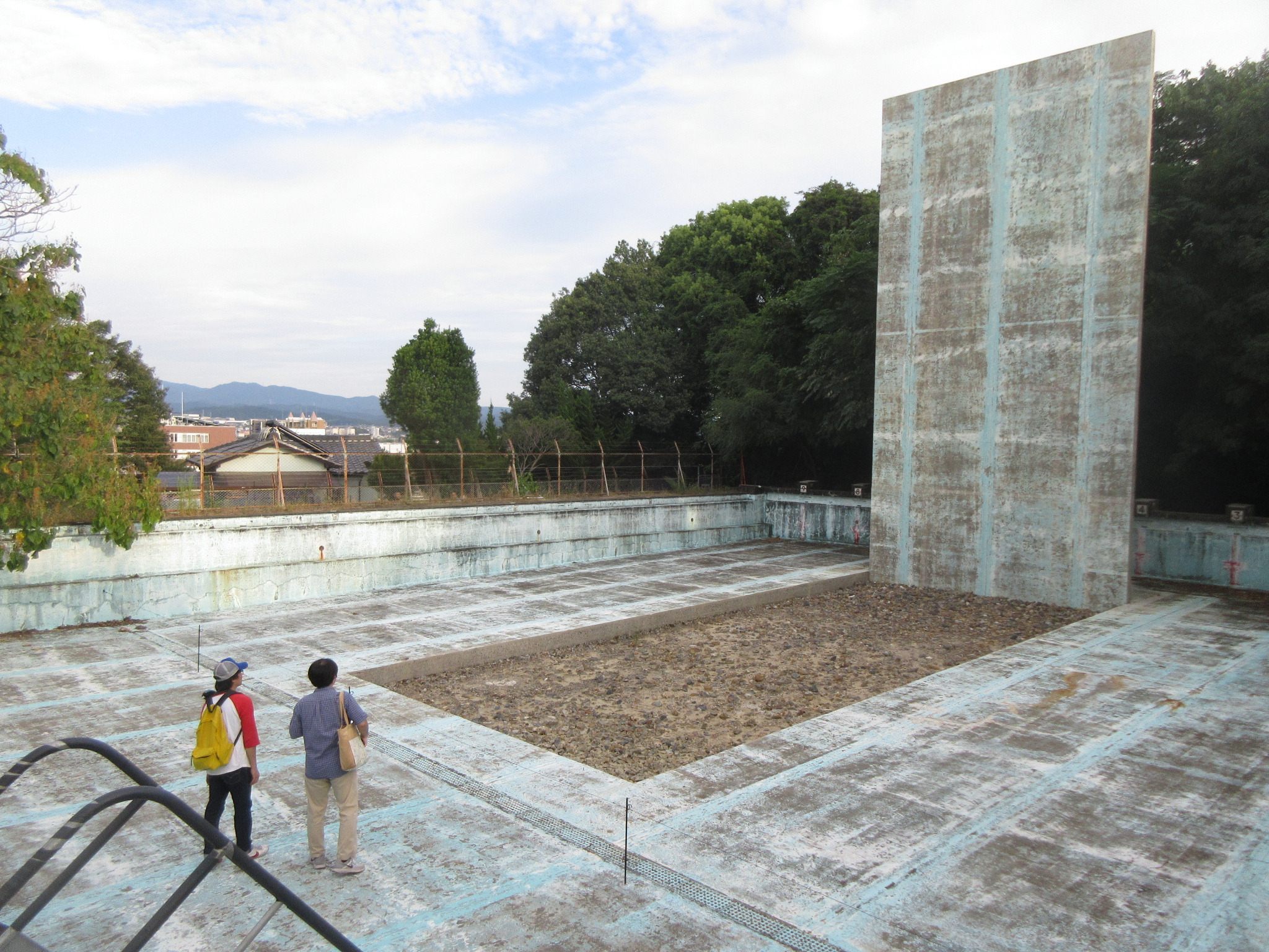 旧愛知県立豊田東高等学校の跡地（豊田市小坂本町）